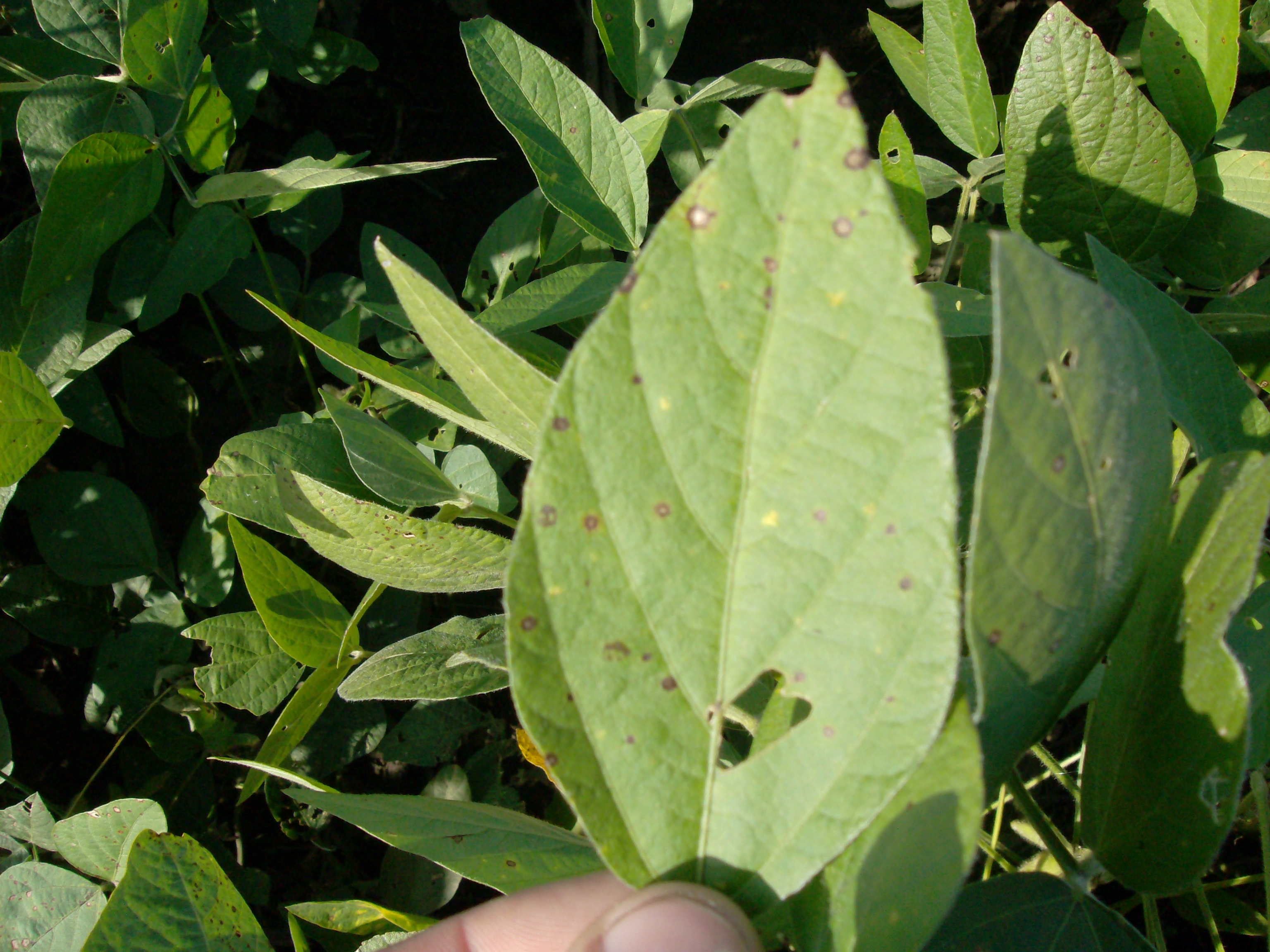 Foto de hoja de un cultivo de Soja. Se puede observar el daño generado por la enfermedad Mancha Ojo de Rana.